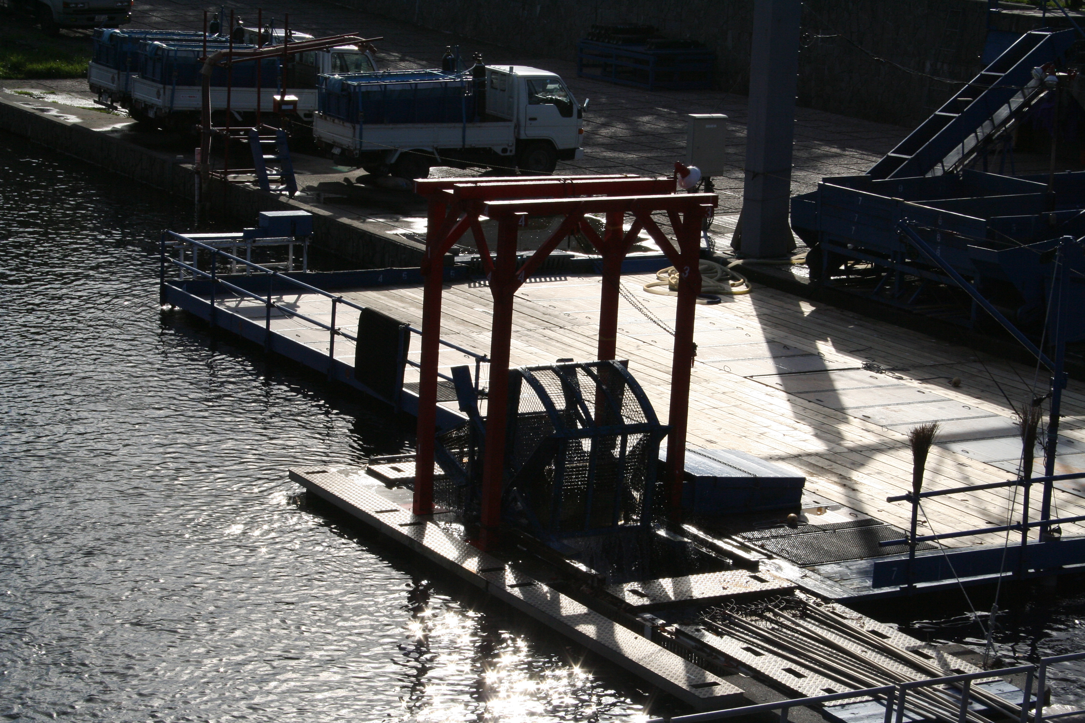 Fish Wheel（インディアン水車）,北海道千歳市で撮影